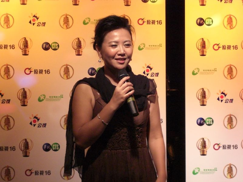 第43屆金鐘獎台灣公共廣播電視集團慶功宴，電視金鐘獎戲劇節目女配角獎得獎者王琄。